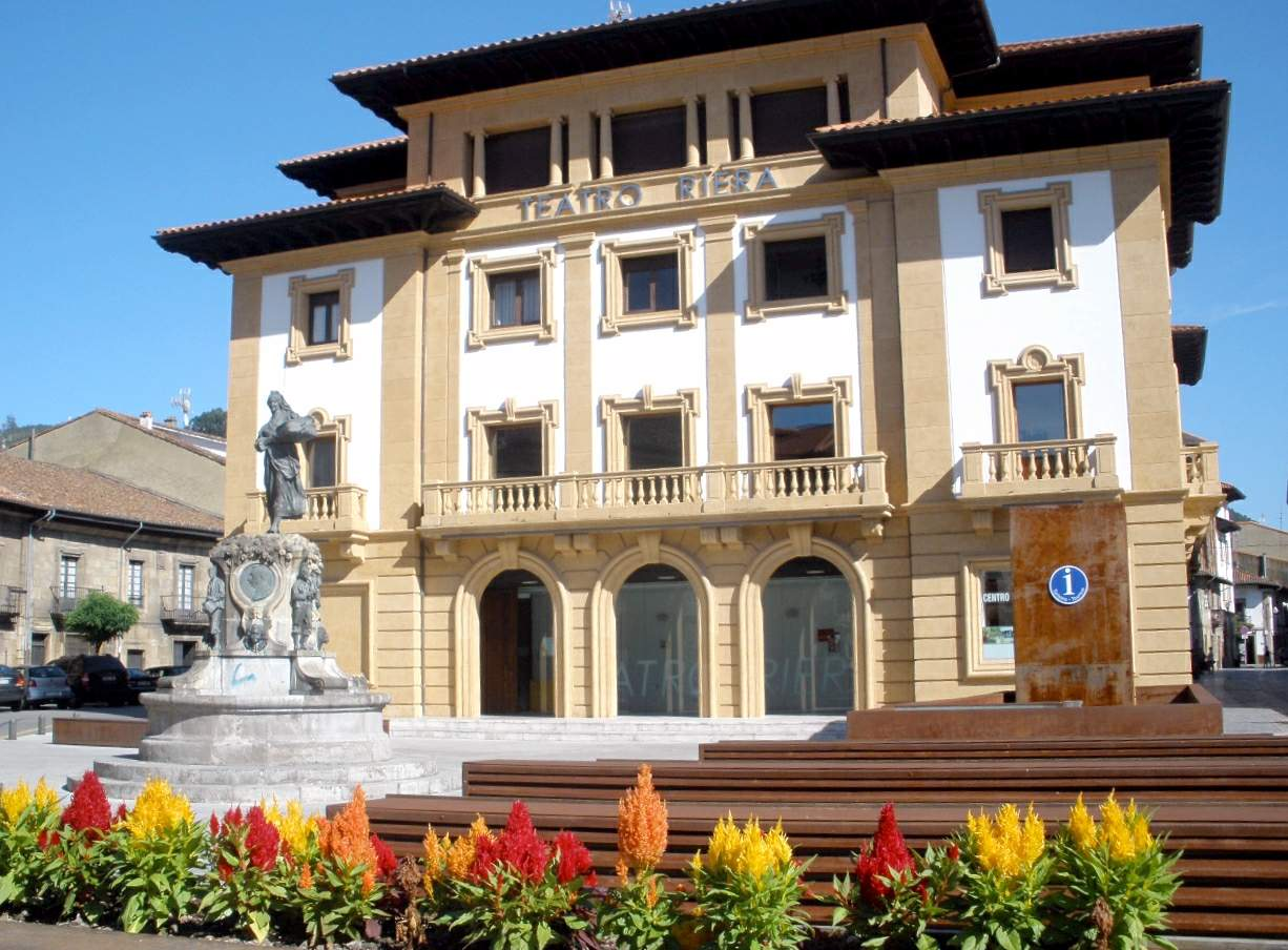 Teatro Riera (Villaviciosa, Asturias)